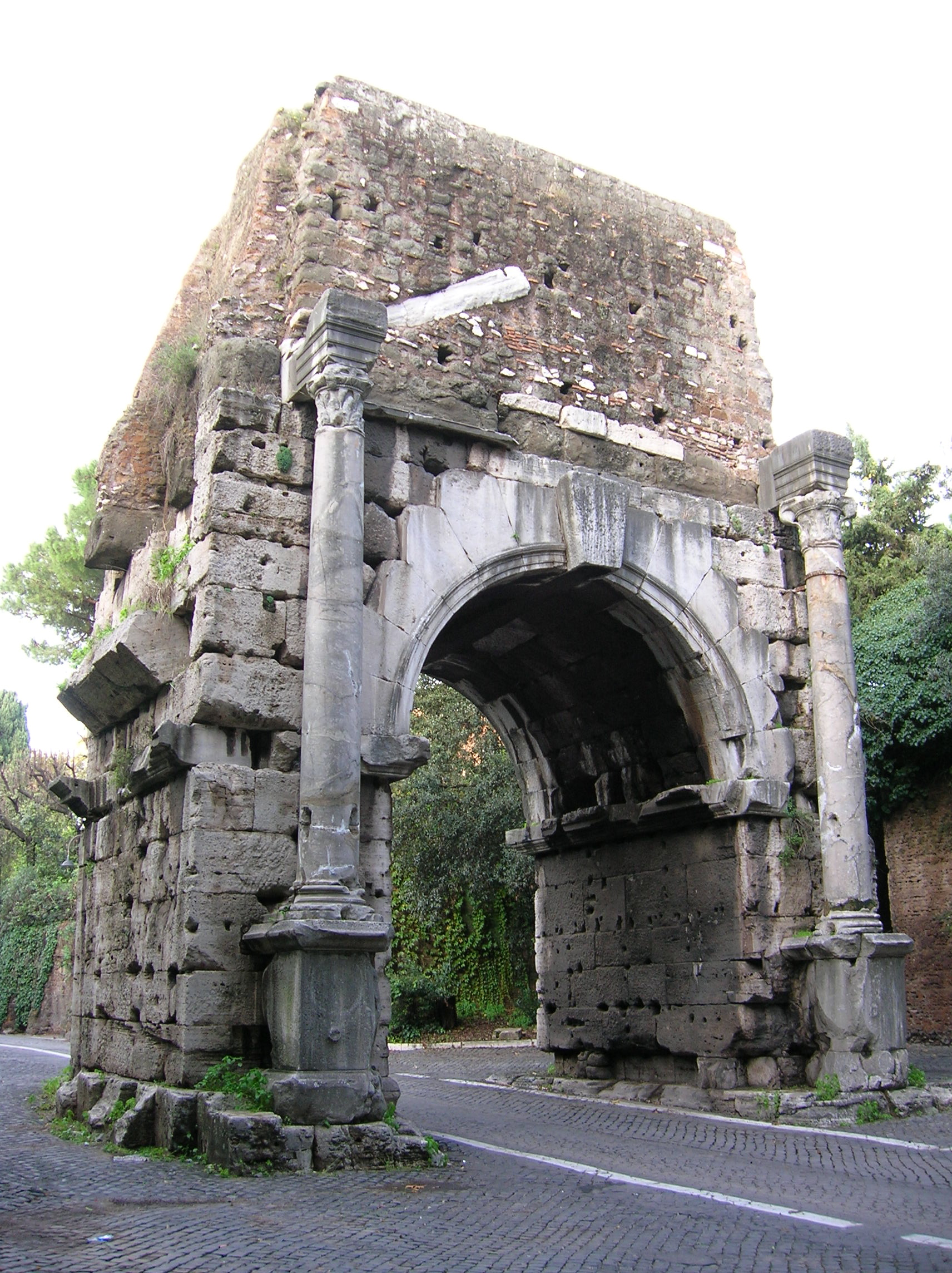 Face externe de l'Arc de Drusus à la porta San Sebastiano sur l'Appia Antica de Rome